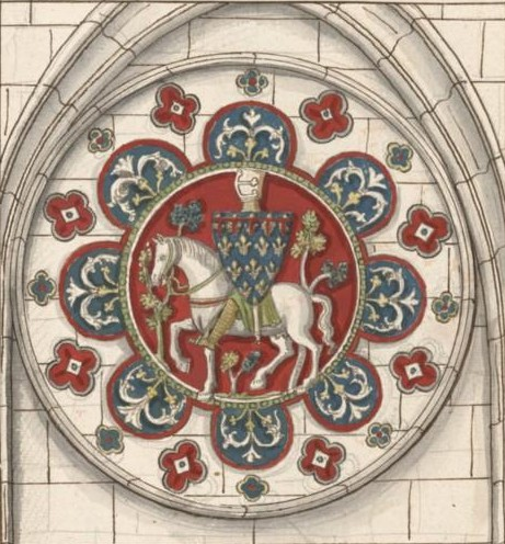 Philippe Hurepel de Clermont